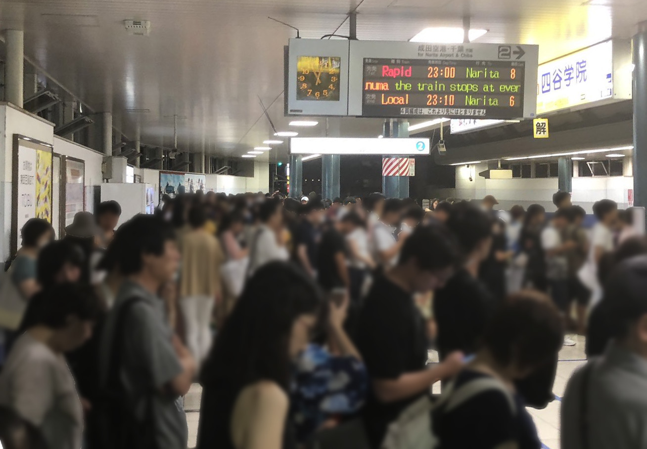 午後11時頃の京成船橋駅の様子